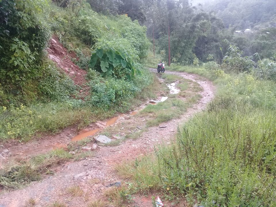 Lauala